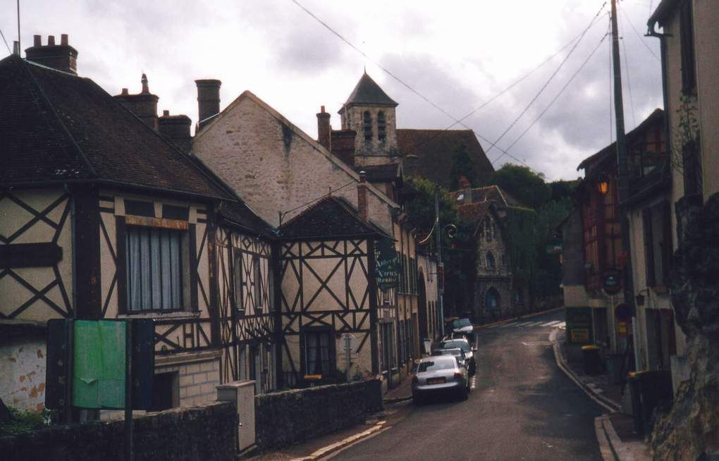 Rue de la Libération. Une des principales rues de Montigny-sur-Loing. Au premier plan, ancienne "Auberge du vieux Moulin", à l'arrière-plan, l'église St-Pierre et St-Paul.